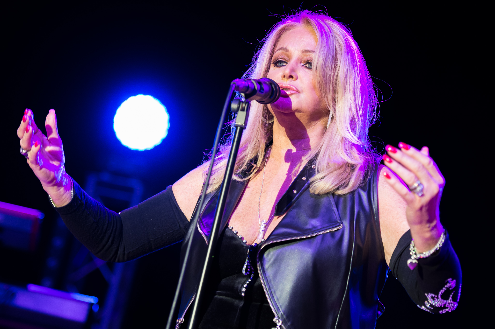 Bonnie Tyler,Concertbüro Franken,Greatest Hits Tour,Konzert,Livekonzert,Livemusik,Meistersingerhalle,Musik